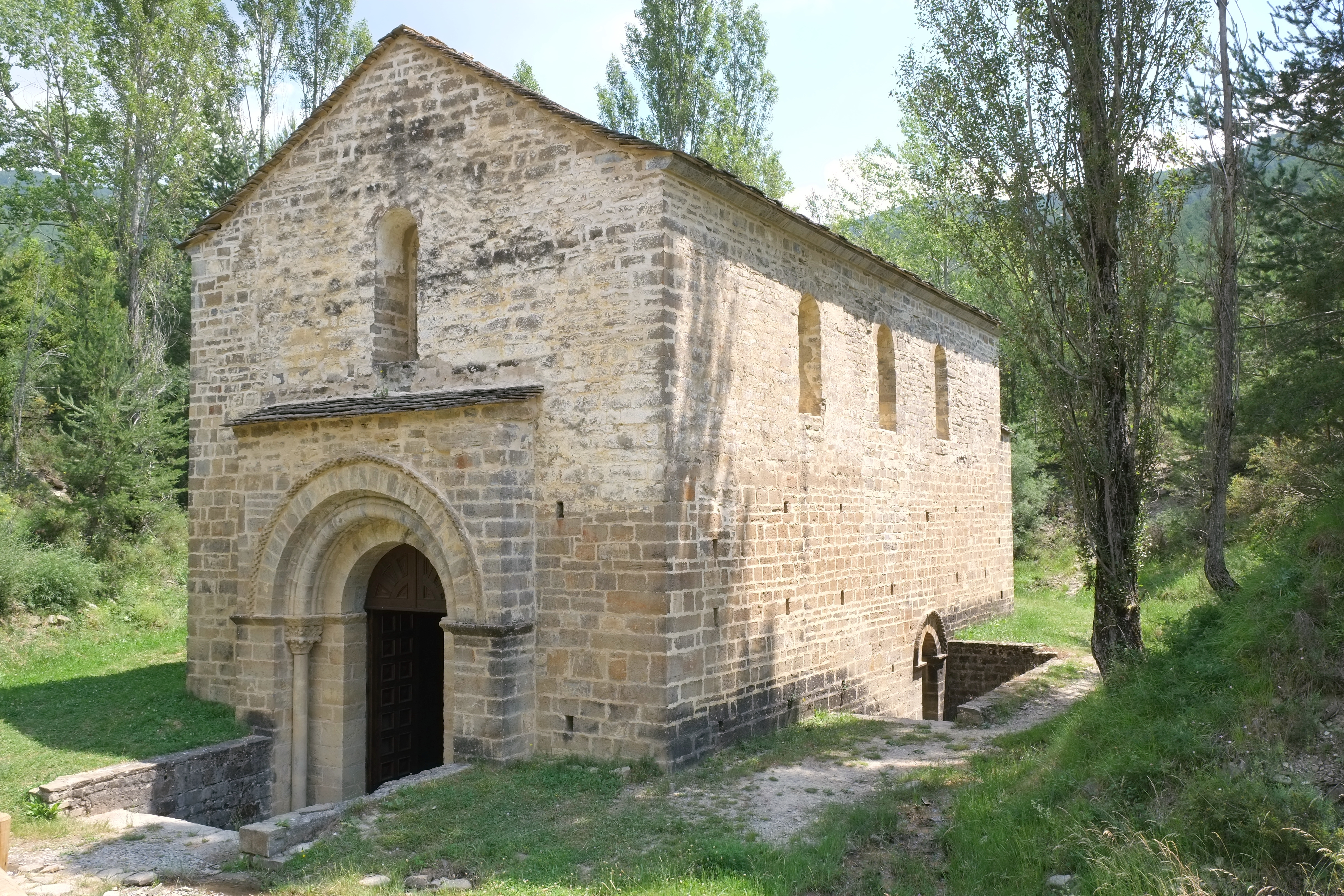 Ehemalige Klosterkirche San Adrián de Sasabe in Borau in der Provinz Huesca in Aragonien (Spanien)